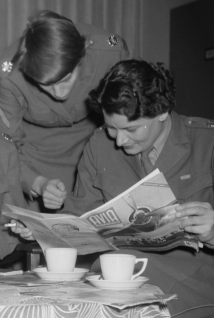 Collectie / Archief : Fotocollectie Anefo Reportage / Serie : [ onbekend ] Beschrijving : Opleiding reserve Milvas te Den Haag . Rust na diensttijd Datum : 12 december 1956 Locatie : Den Haag, Zuid-Holland Trefwoorden : DIENSTTIJD, opleiding, reserves, rusten Instellingsnaam : Milva Fotograaf : Pot, Harry / Anefo Auteursrechthebbende : Nationaal Archief Materiaalsoort : Negatief (zwart/wit) Nummer archiefinventaris : bekijk toegang 2.24.01.04 Bestanddeelnummer : 908-1909